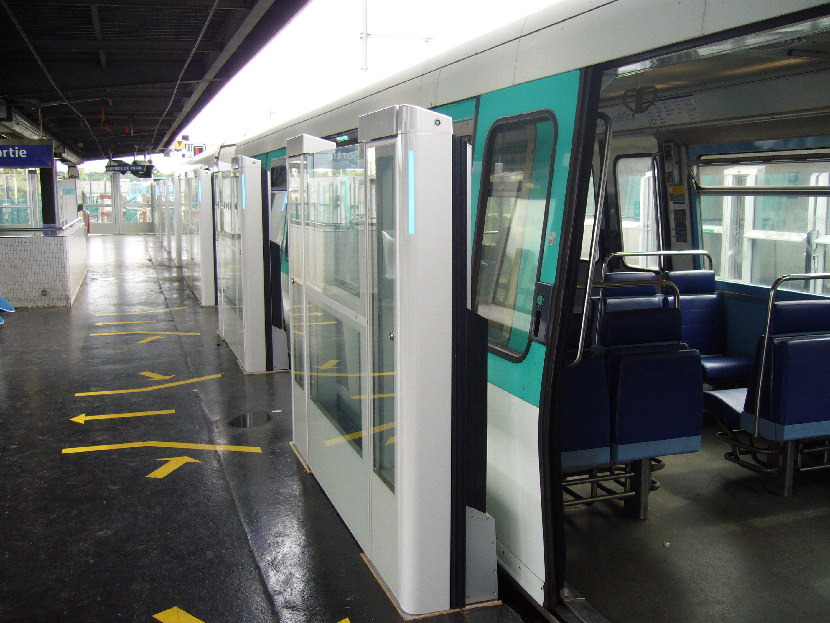 Portes palières protégeant les voies de la station Châtillon Montrouge sur la ligne 13 du Métro de Paris avec un MF 77 à quai.